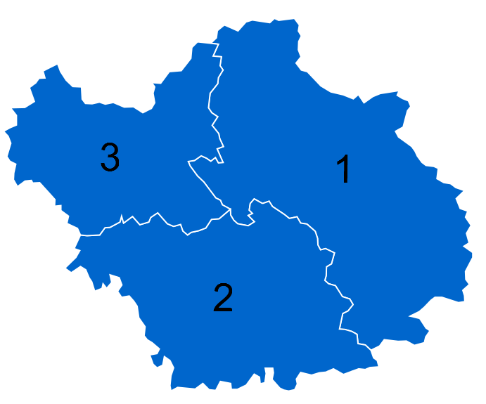 Résultats des élections législatives de l'Aube en 2012